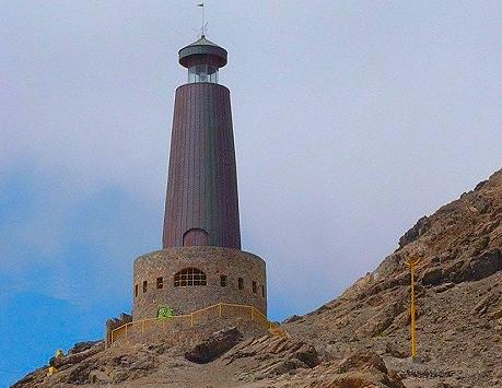 Faro Monumental de Chañaral